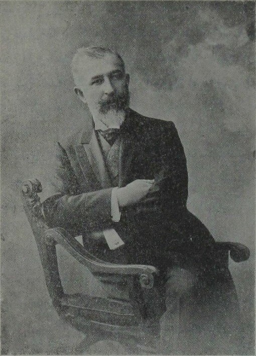 Halid Ziya Uşaklıgil'in Nevsal-i Milli (Milli Yıllık)'dan alınmış meşhur fotoğrafı.